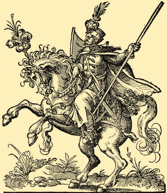 Magyar huszár a XVI.-ik században : Jost Ámán rajza után készült egykorú fametszet. Ernst Lajos gyűjteményének eredeti példányáról